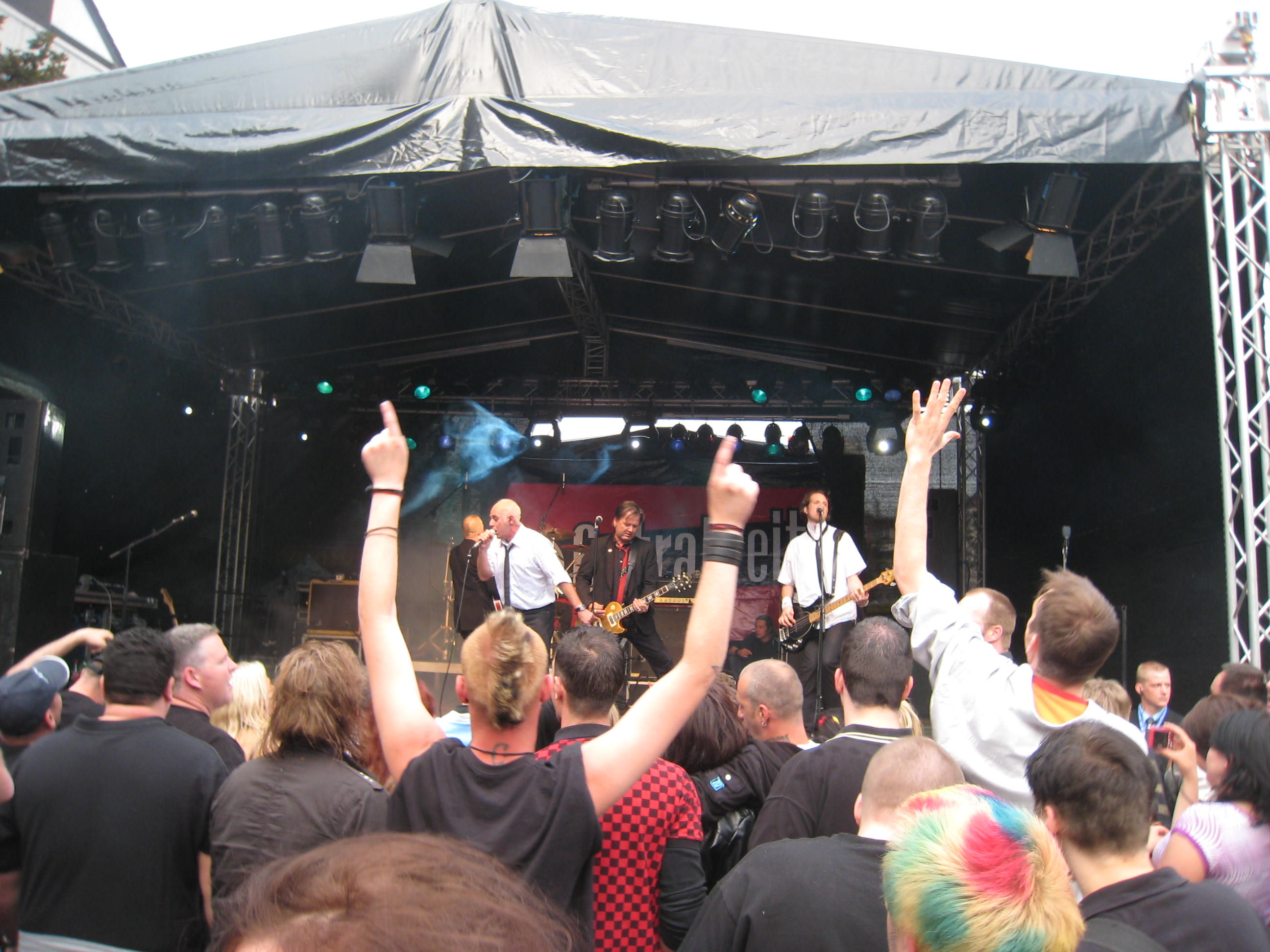 Extrabreit, Internationale Woche Dortmund